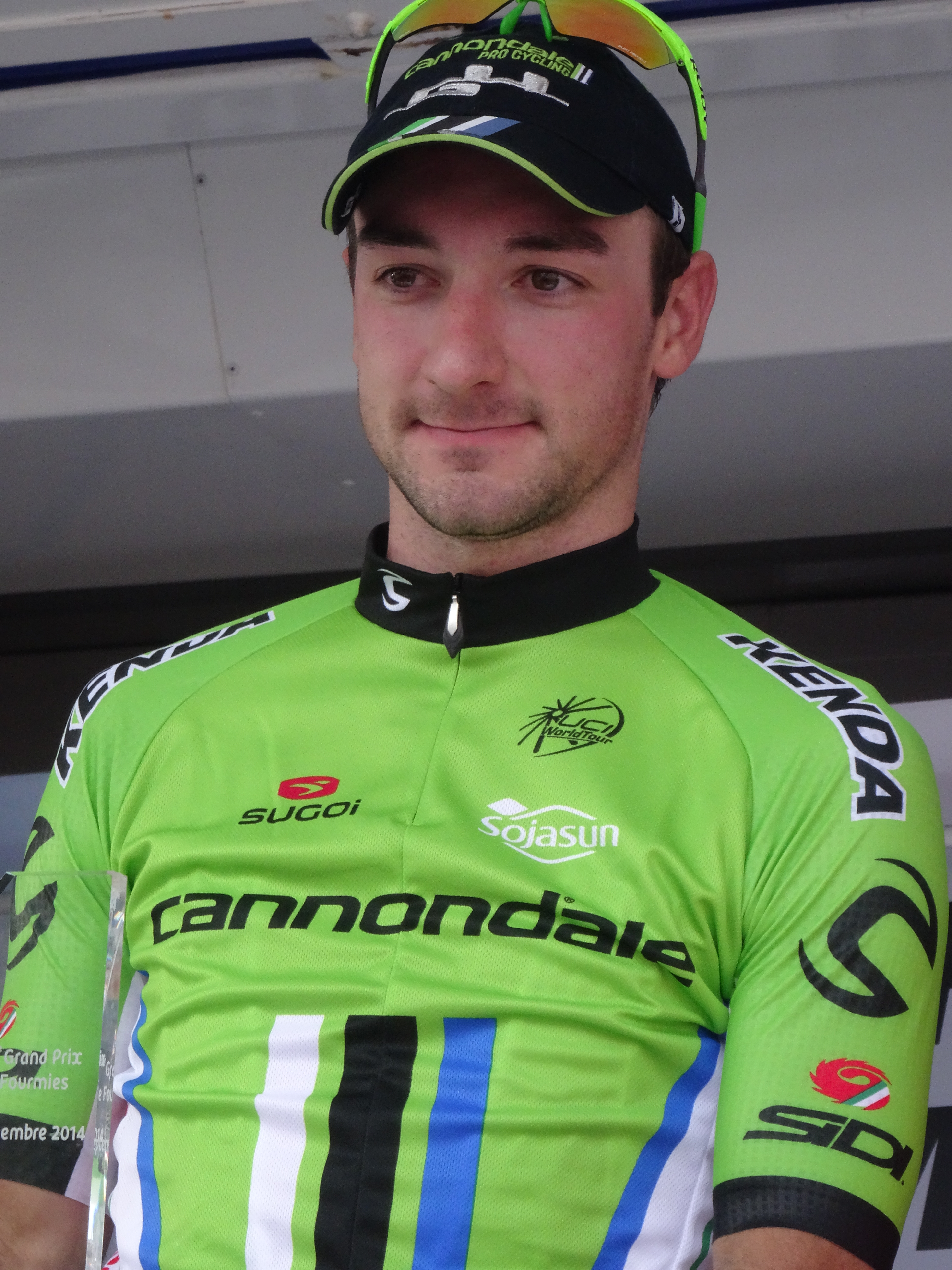 Reportage photographique réalisé le dimanche 7 septembre à l'occasion du départ et de l'arrivée du Grand Prix de Fourmies 2014 à Fourmies, Nord-Pas-de-Calais, France.